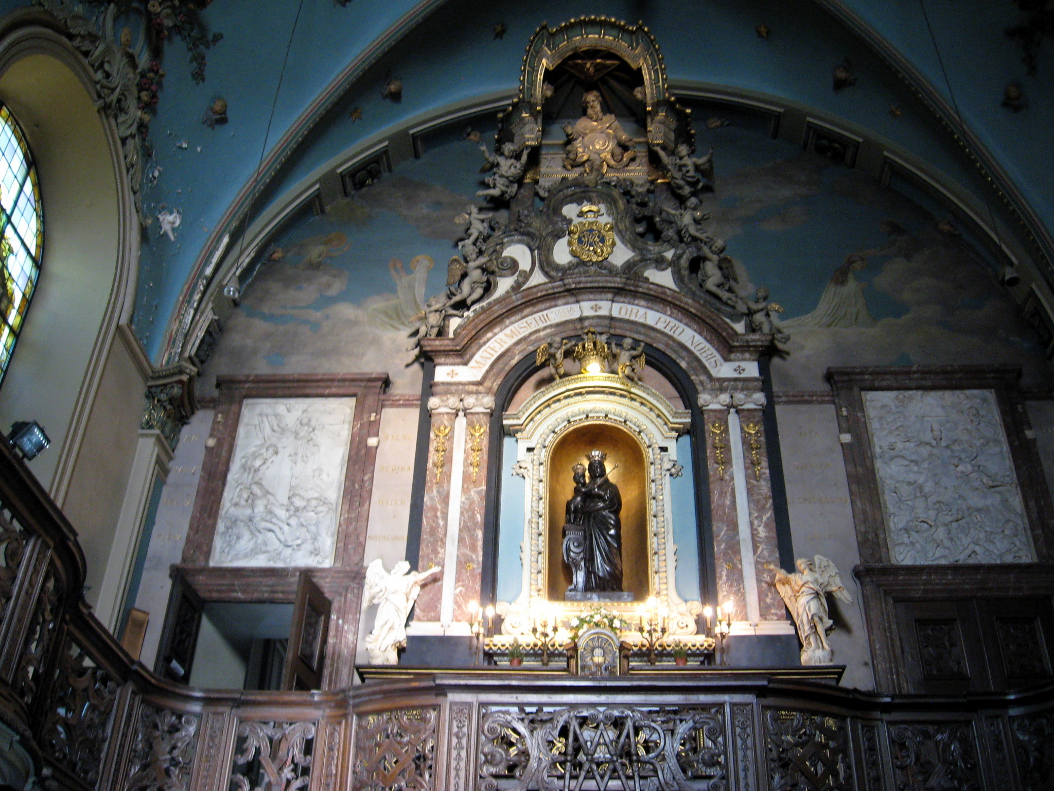 Binnenzicht van de Onze-Lieve-Vrouwkerk in Verviers